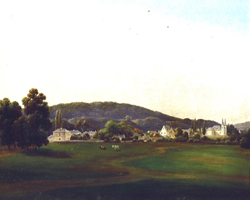 Kaisersteinbruch 1842